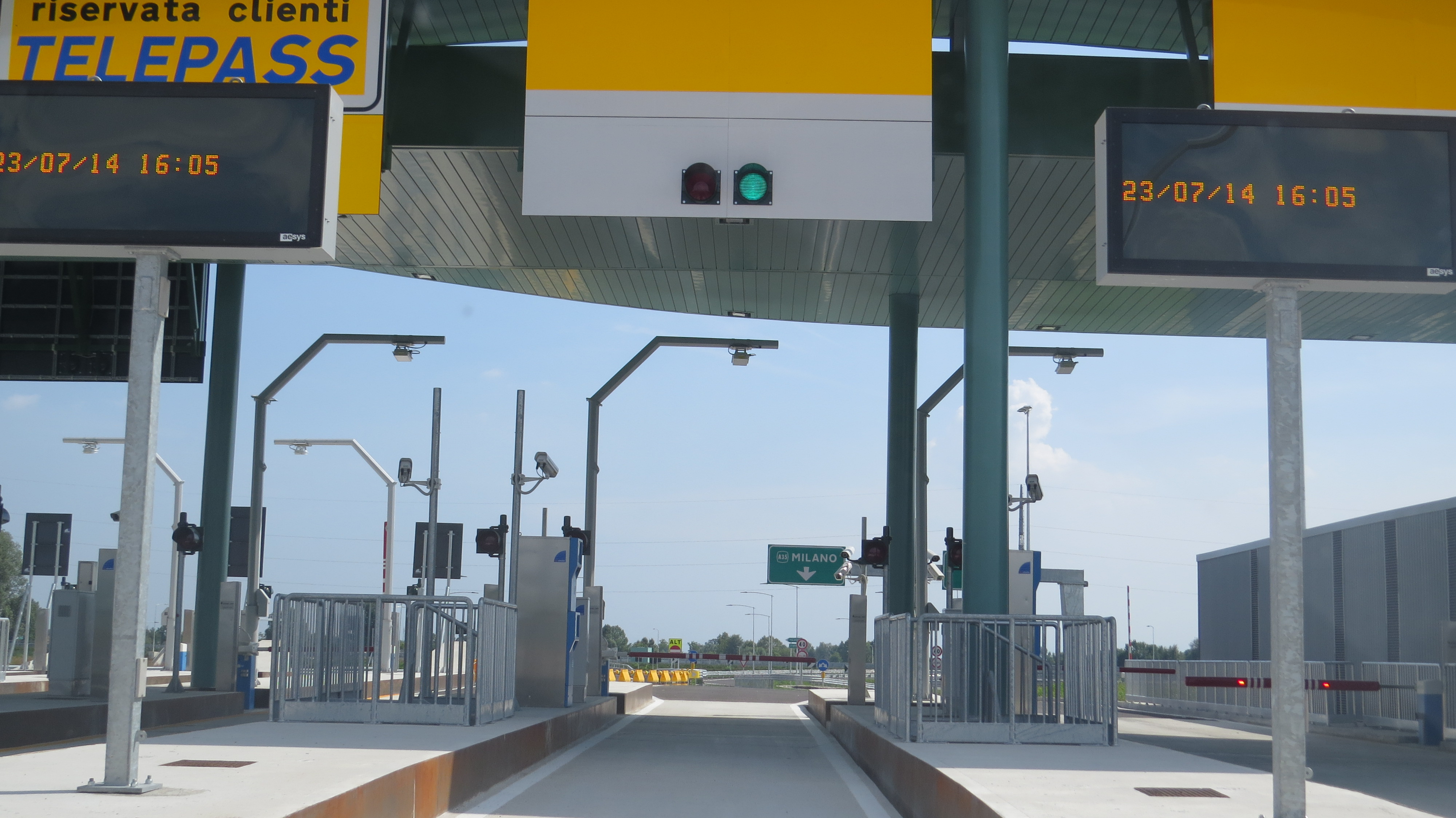 Pista Casello di Bariano